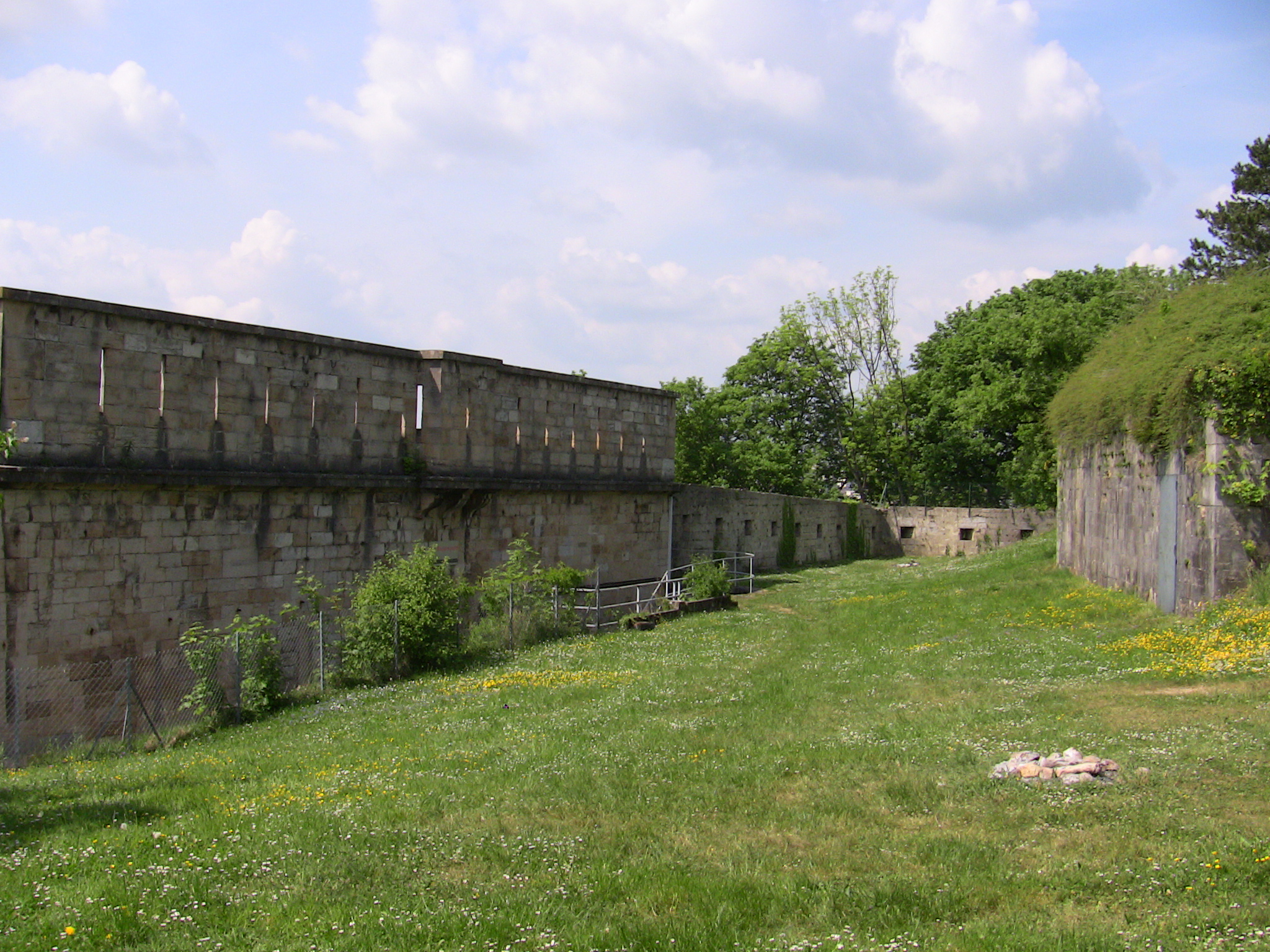 Vue du casernement du fort de Beauregard à Besançon (Doubs, France).